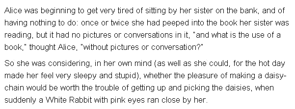 תחילתו של Alice's Adventures in Wonderland